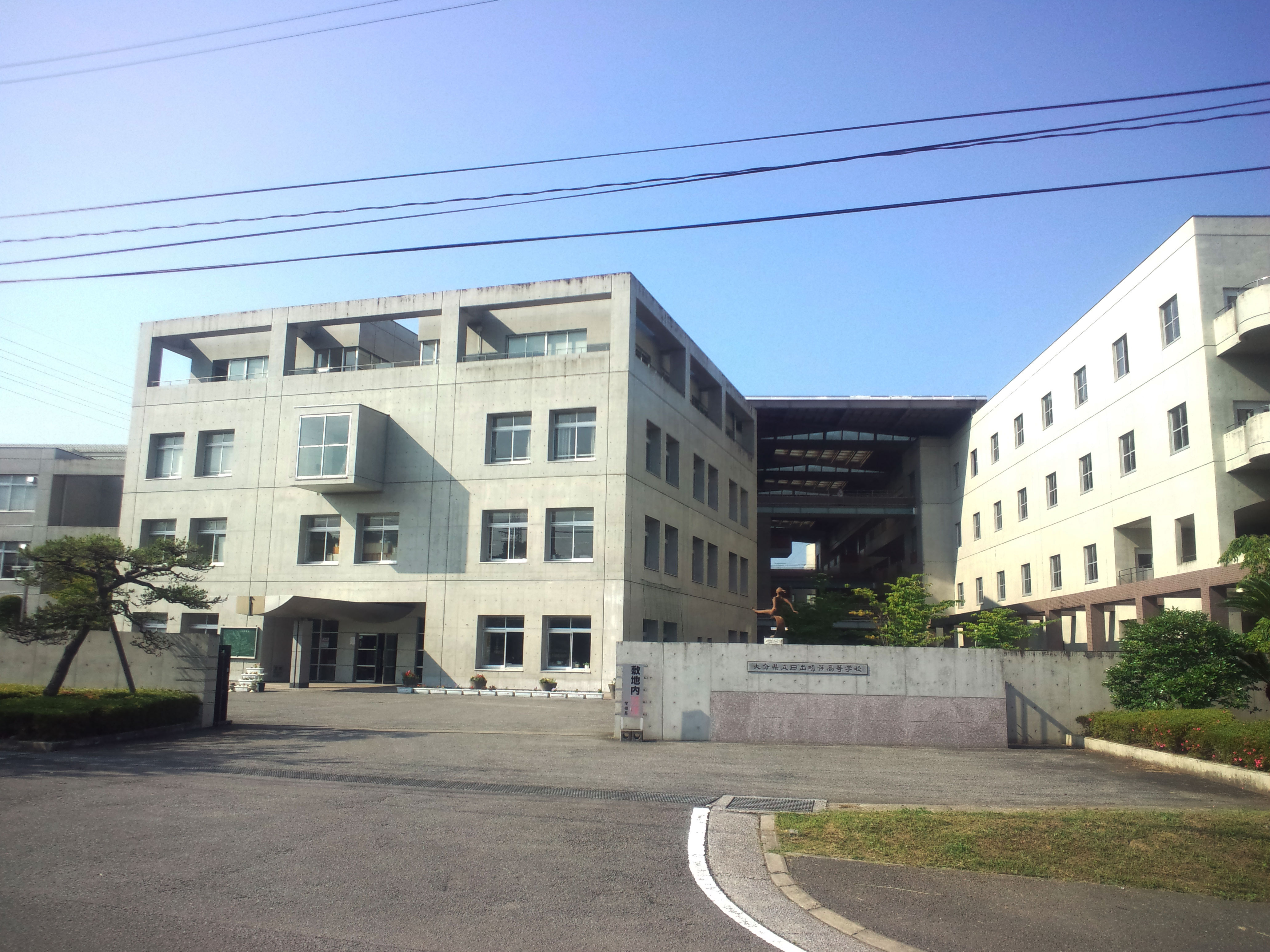 暘谷高校正門付近の画像です。